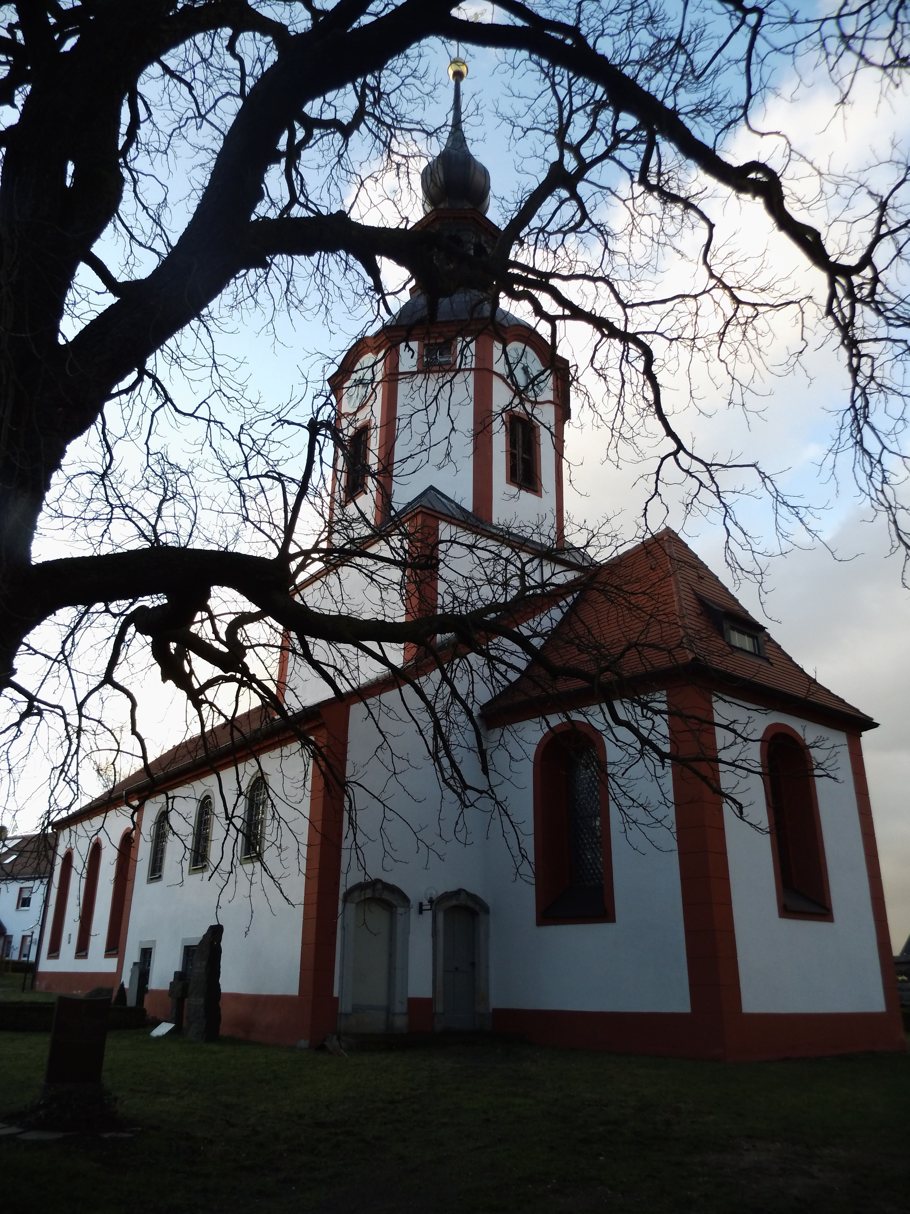 Die St. Nikolai-Kirche in Machern vom Friedhofs-Portal aus gesehen. – Foto: Holger Zürch